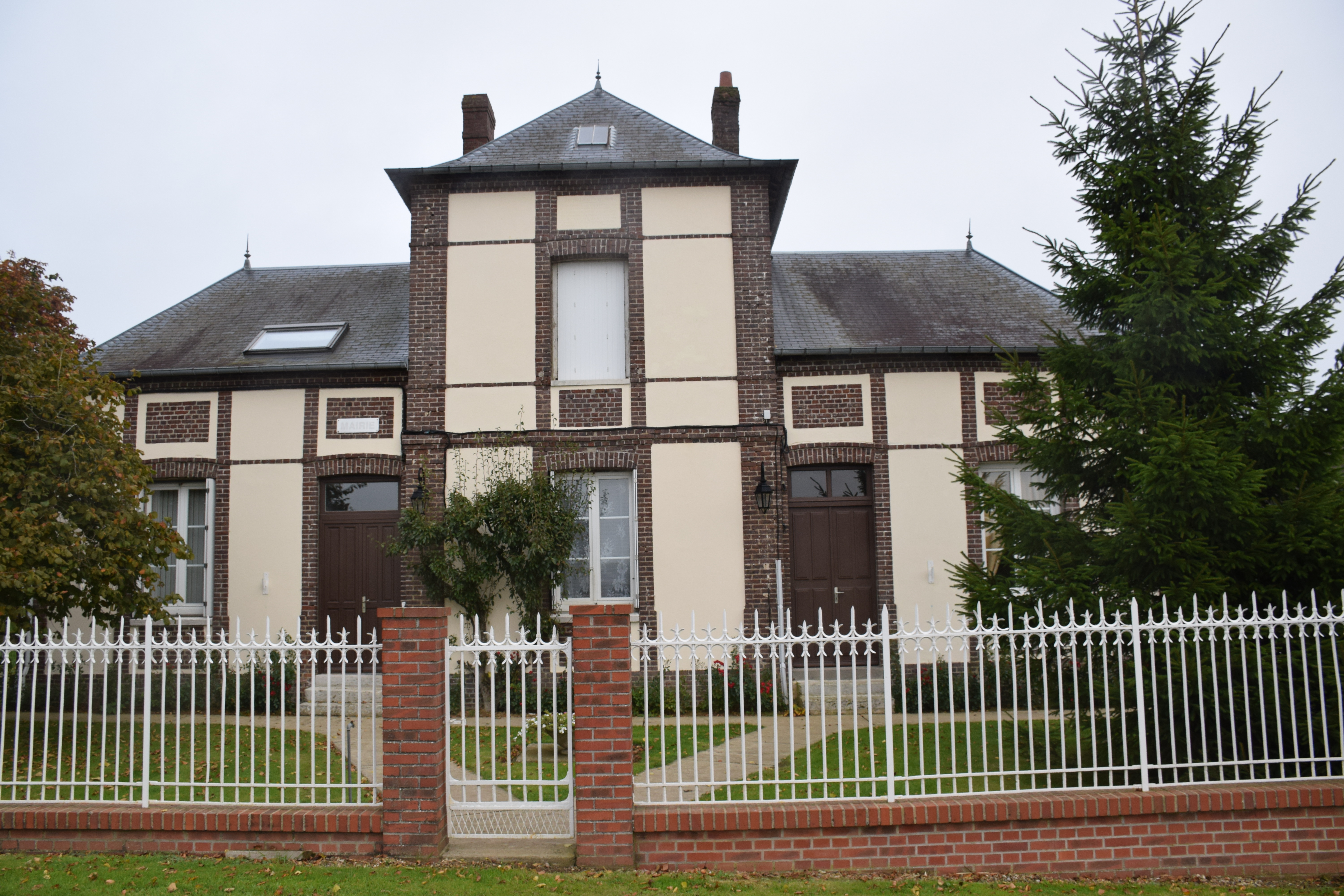 Mairie